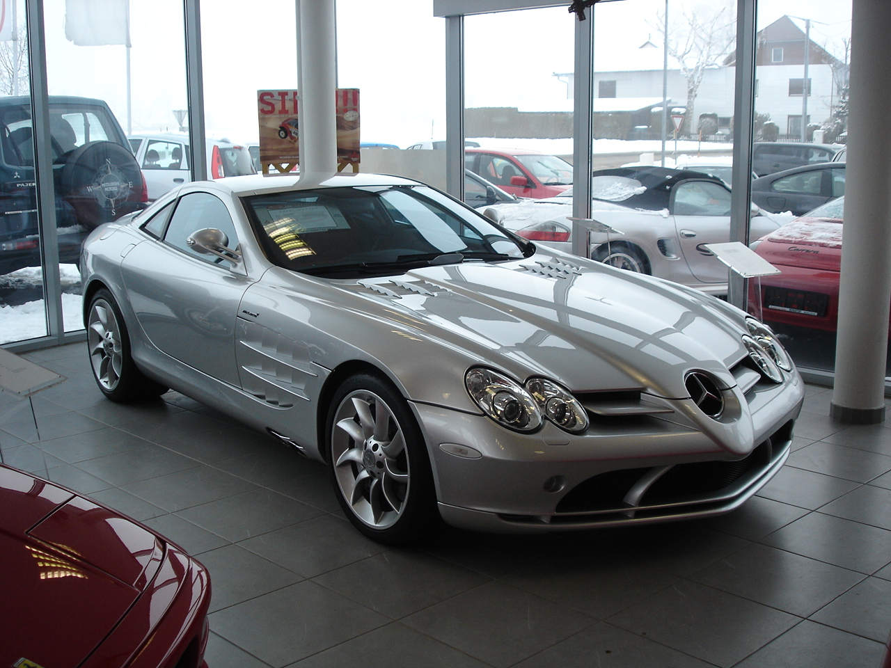 Mercedes SLR McLaren in Silber fotografiert im Autohaus Schuster